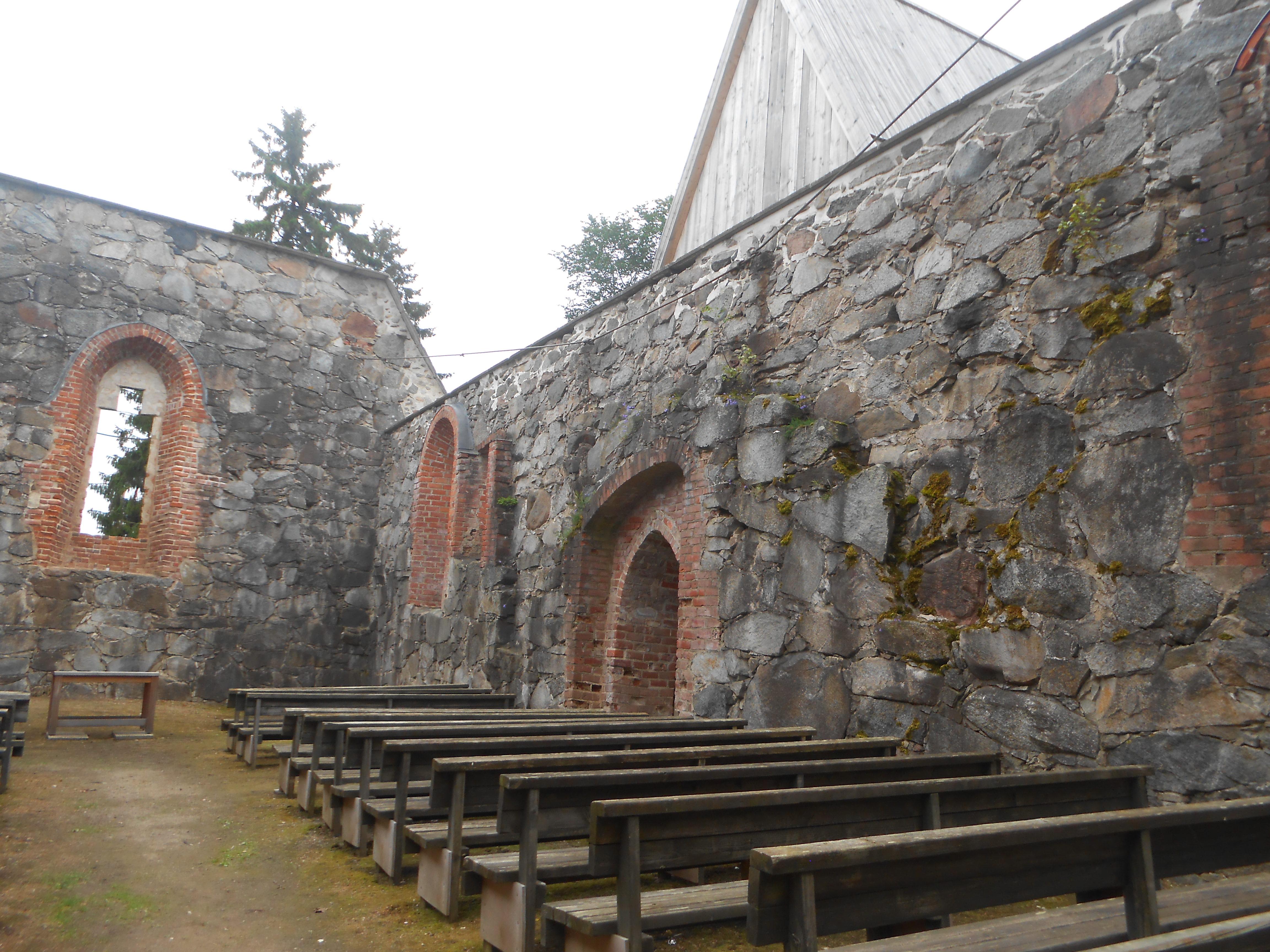 Pälkäneen rauniokirkko sisältä kesällä 2016.